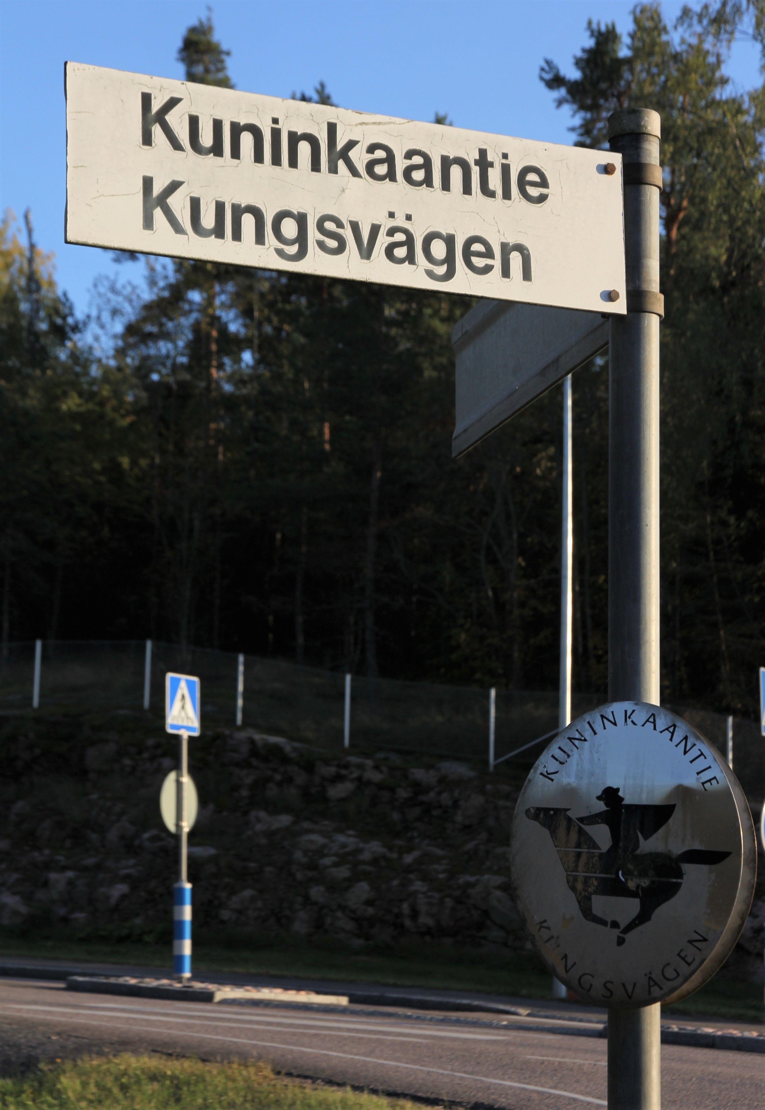 Kuninkaantien viitta Ylästöntien risteyksessä, Vantaan Ylästön kaupunginosassa.